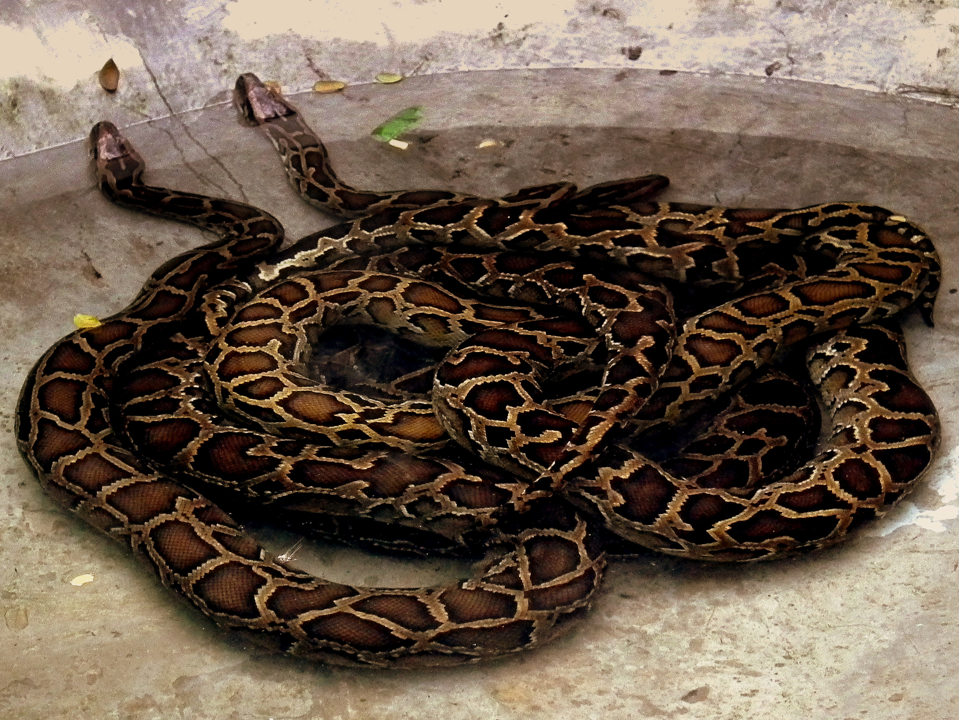 SAIGON ZOO VIETNAM JAN 2012